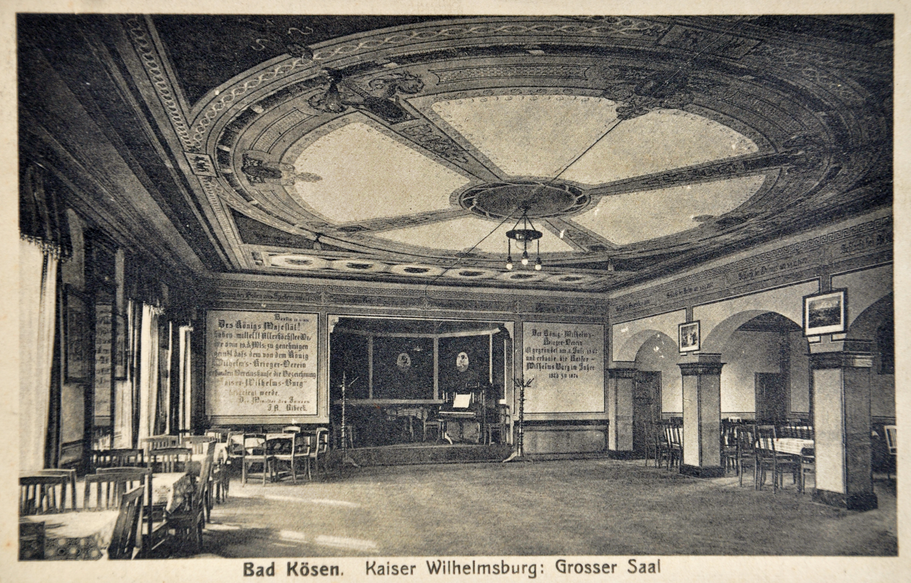 Bad Kösen, Festsaal des Berghotels Wilhelmsburg um 1900 (im alten Originalzustand)